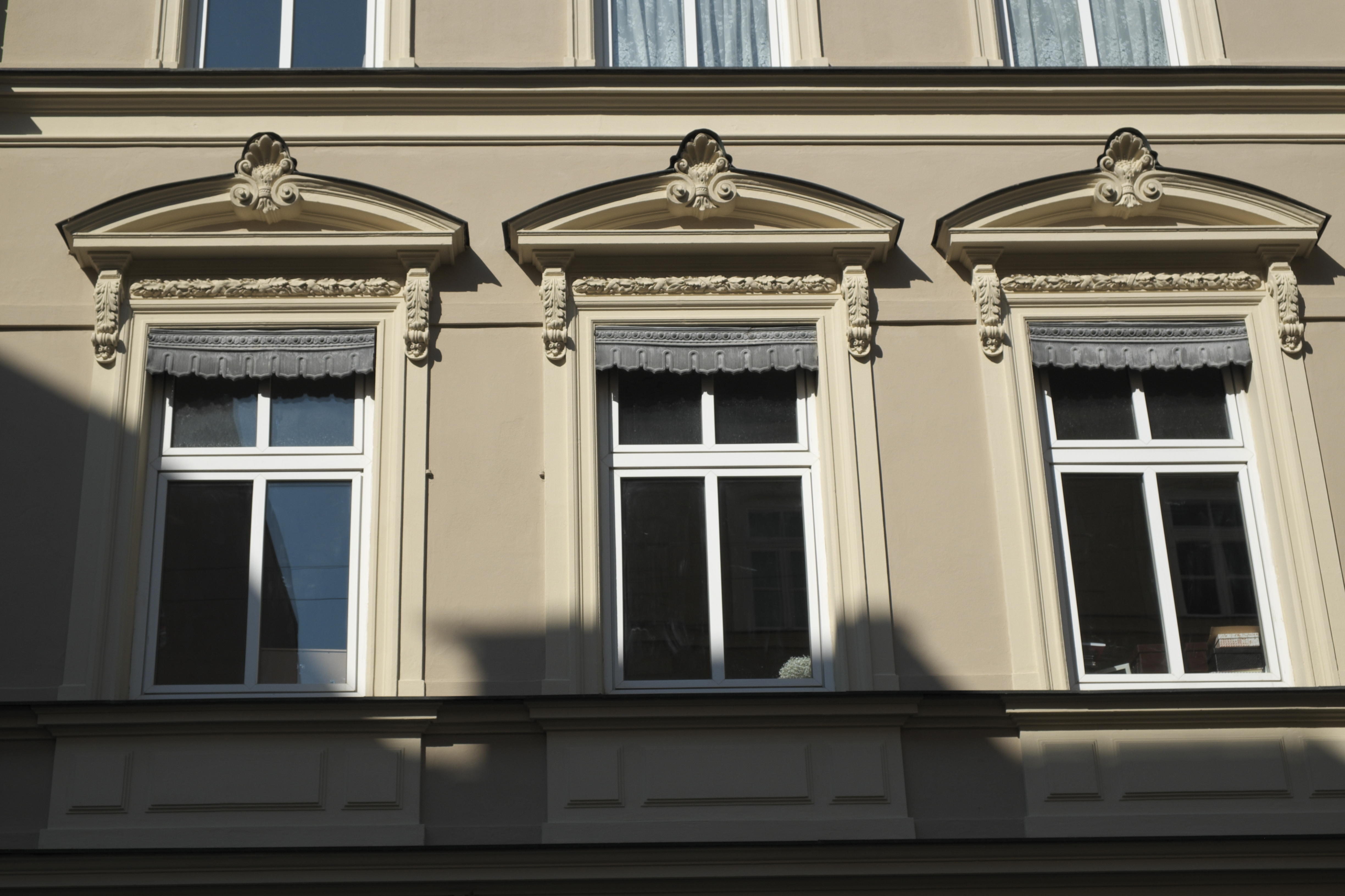 Mietshaus in der Schleißheimer Straße 25 im Stadtbezirk Maxvorstadt in München (Bayern/Deutschland), 1879/80 erbaut